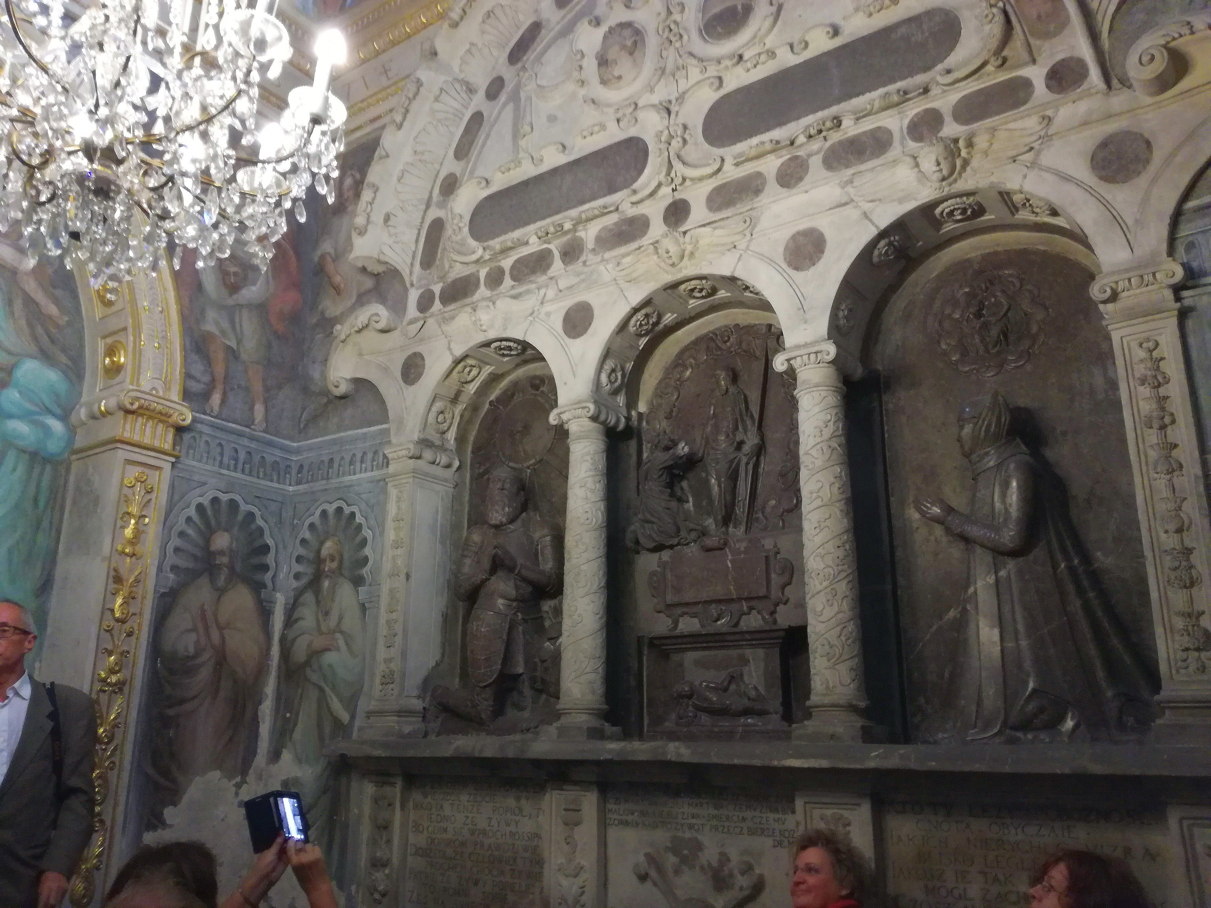 Niepołomice, Kościół Dziesięciu Tysięcy Męczenników w Niepołomicach Wikidata has entry Q11745028 with data related to this item.